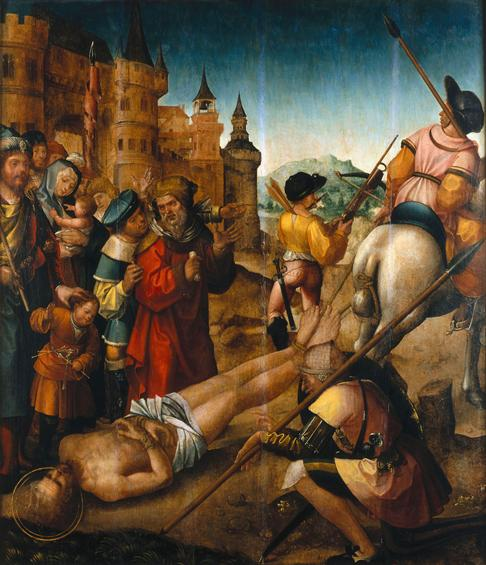 A.117 x L.101 cm